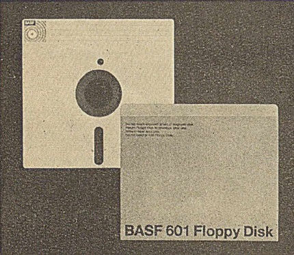 BASF 601, floppy disk